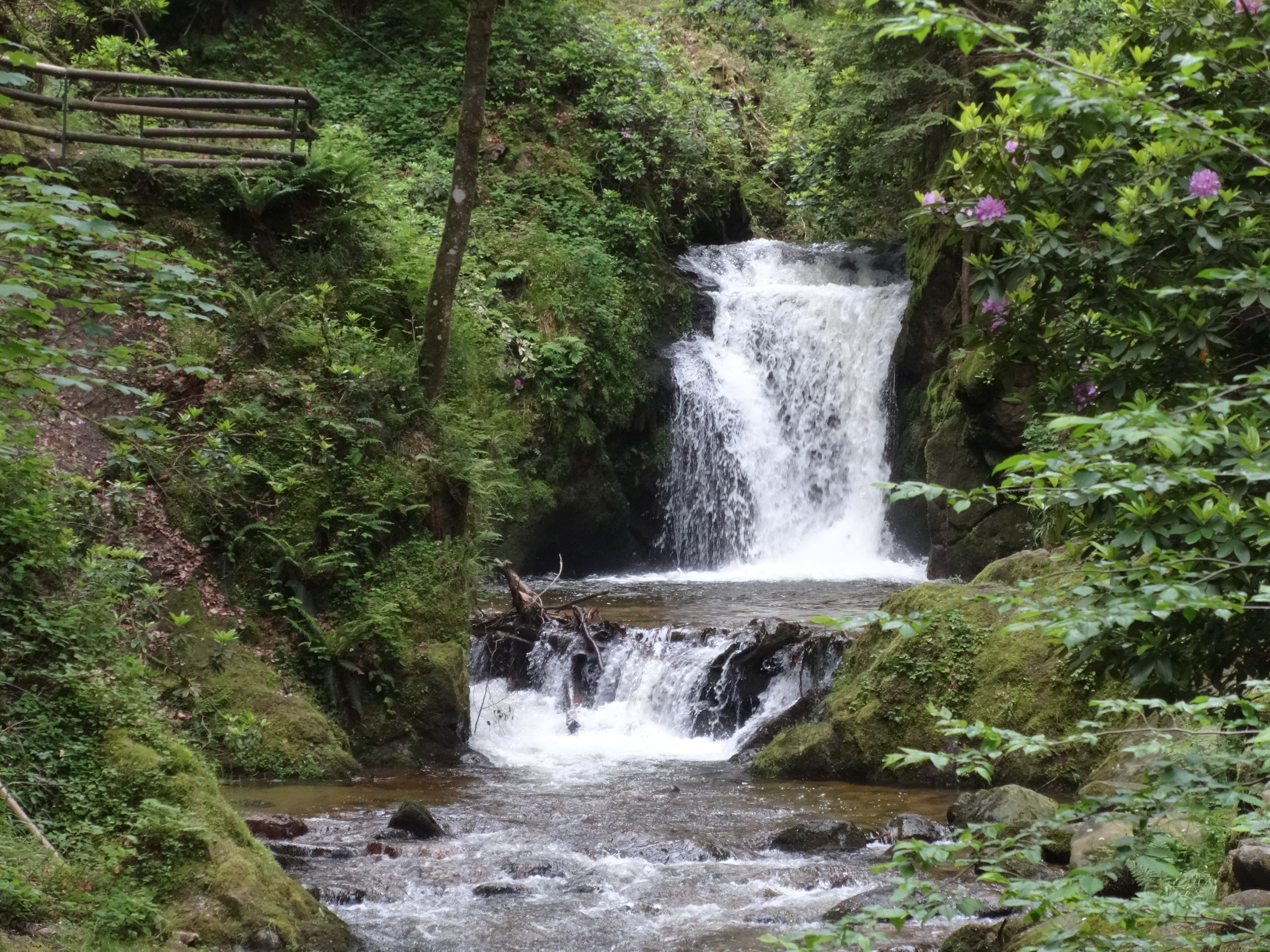 Der Panoramaweg Baden-Baden ist ein rund 40 Kilometer langer Wanderweg, der um die Stadt Baden-Baden führt. Er wurde 1997 neugestaltet und 2004 vom Deutschen Tourismusverband als „schönster Wanderweg“ ausgezeichnet.